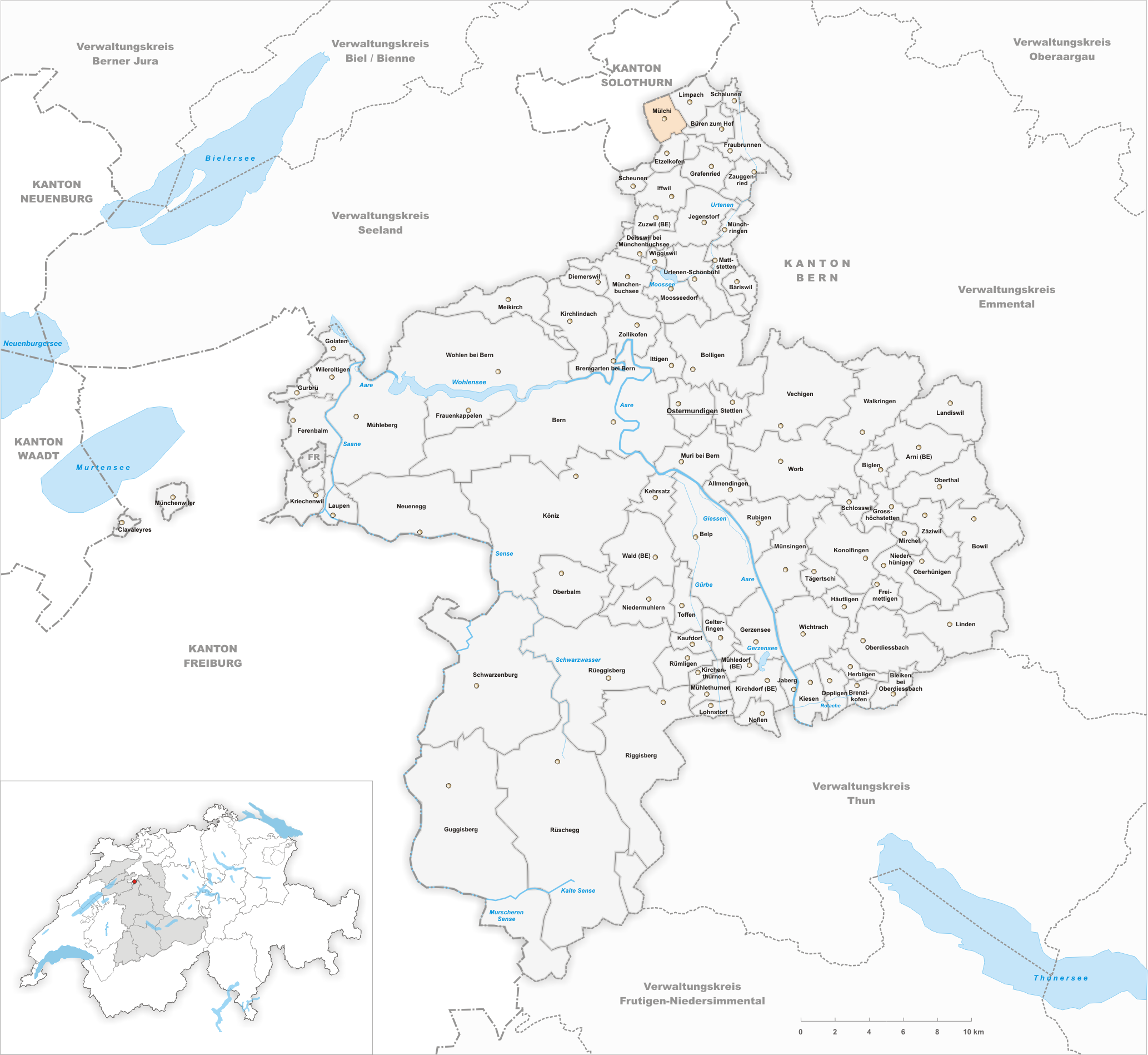 Municipality Mülchi